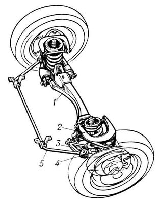 Рисунок, изображающий передний мост автомобиля с независимой подвеской.